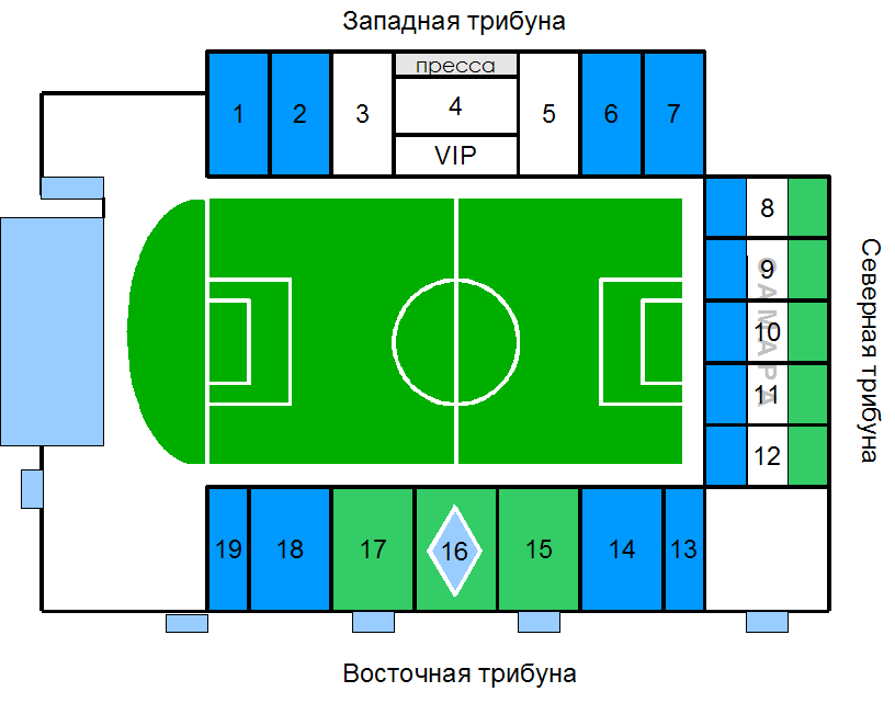 Примерная схема стадиона Металлург (Самара)